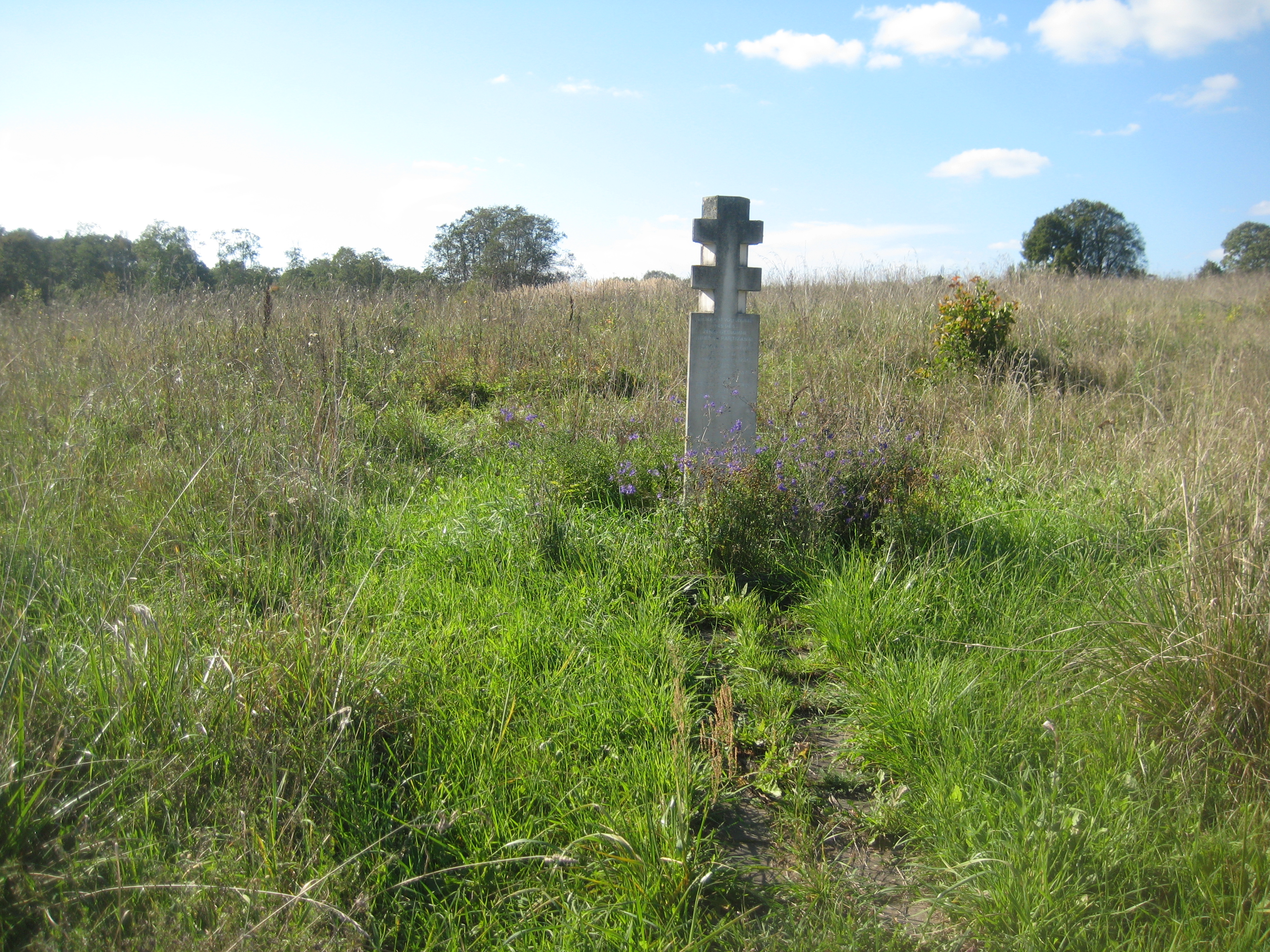 Vilkabrukiai 29356, Lithuania